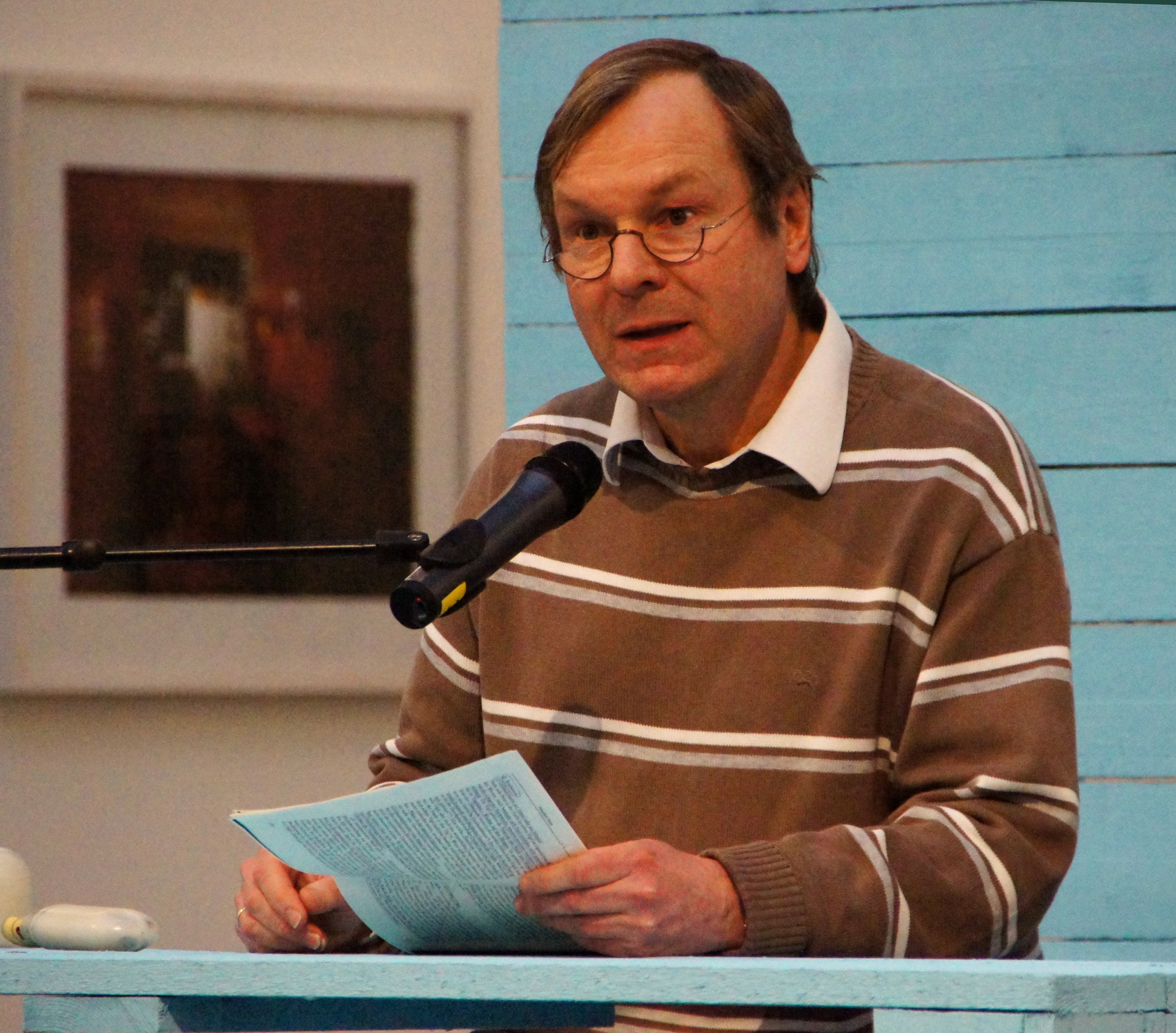 Unter dem Titel "Eine Versammlung kommt selten allein" lasen, anlässlich des 40. Jahrestages der Gründung, Lyriker und Lyrikerinnen der Grazer Autorinnen Autorenversammlung im "Salon für Kunstbuch im 21er Haus". Abgebildete Personen: S. Dateiname.